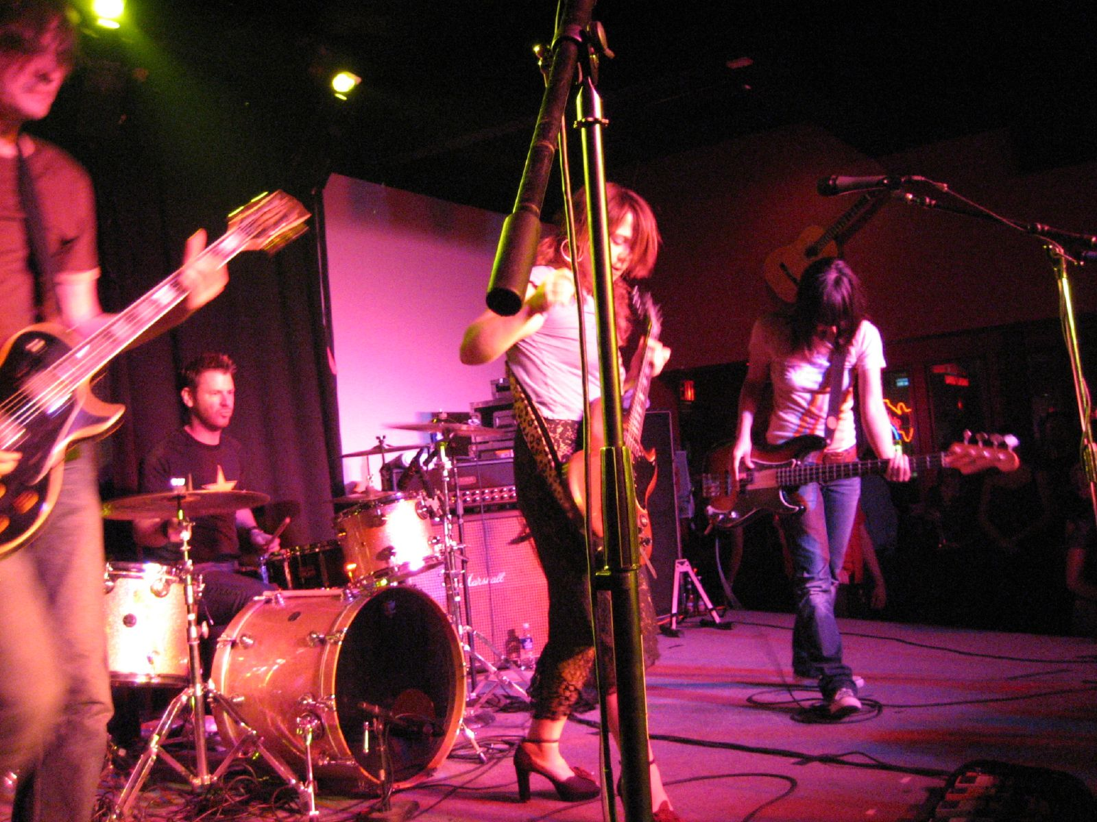 Veruca Salt 2005